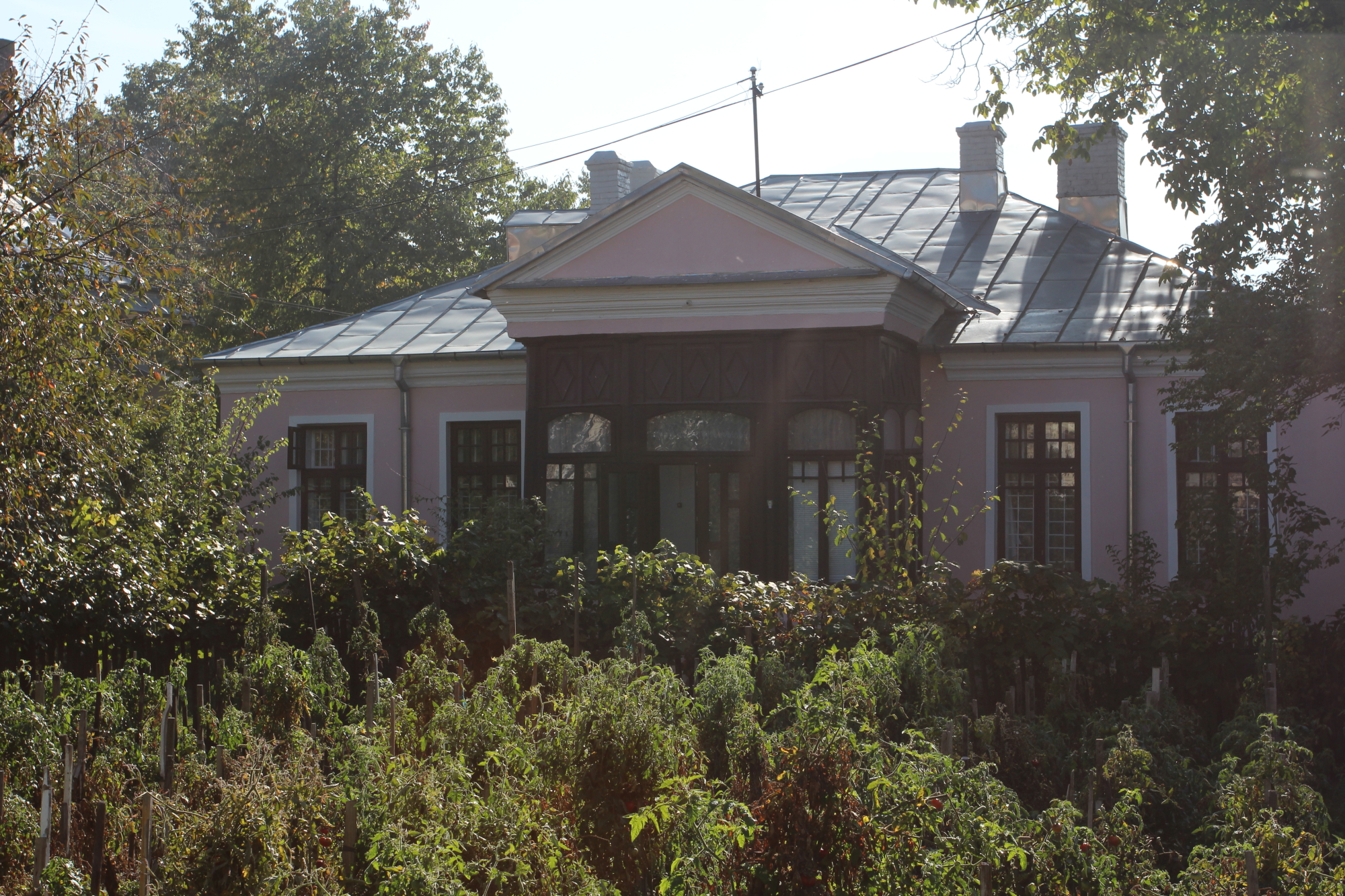 Casă de lemn Ivașcu